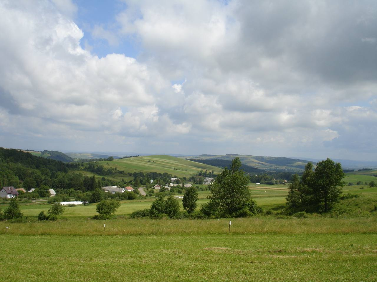 Wieś Tokarnia, powiat sanocki